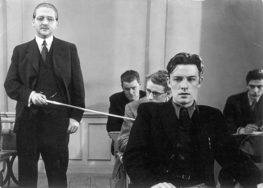 Film "Hets", 1944.